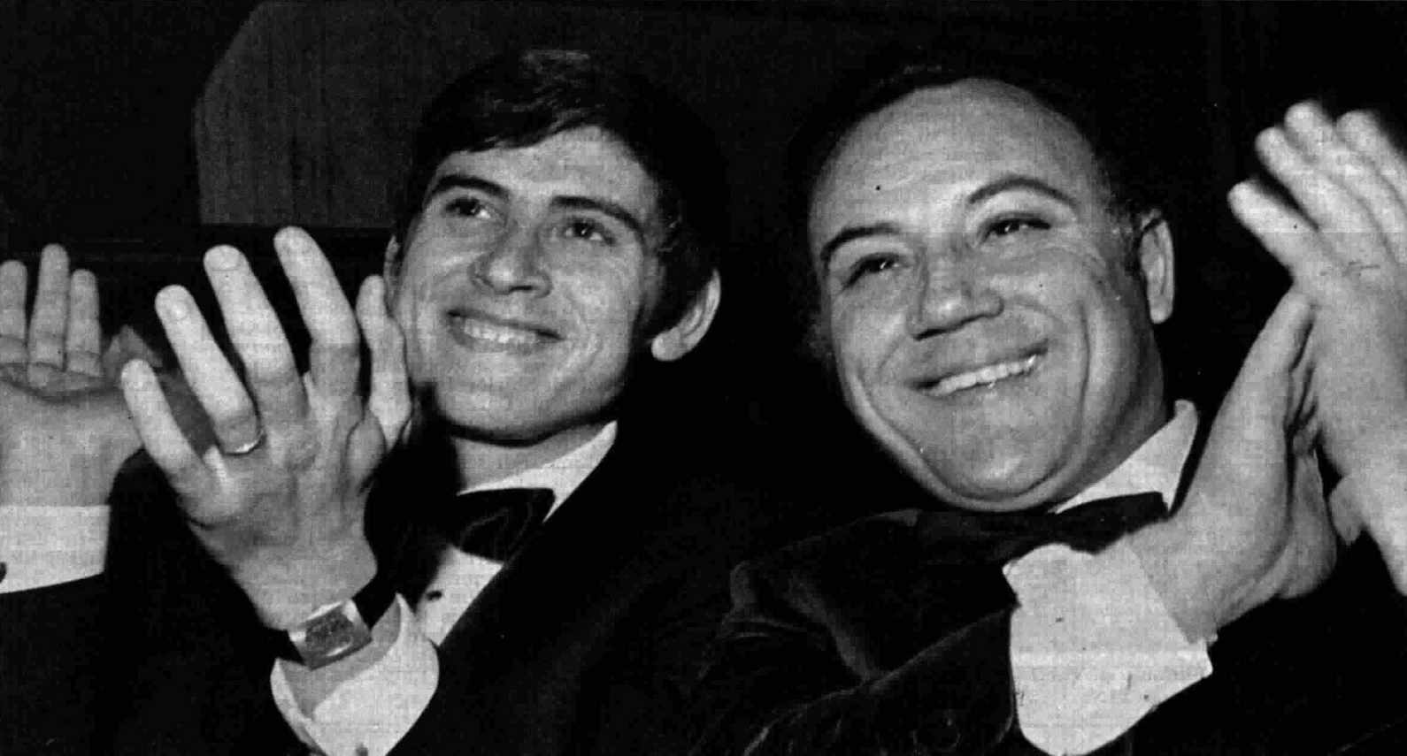 Italian singers Gianni Morandi and Claudio Villa at Canzonissima